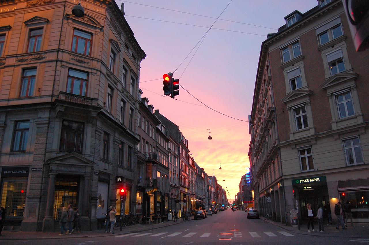 Store Kongensgade seen from Kongens Nytorv in Copenhagen, Denmark